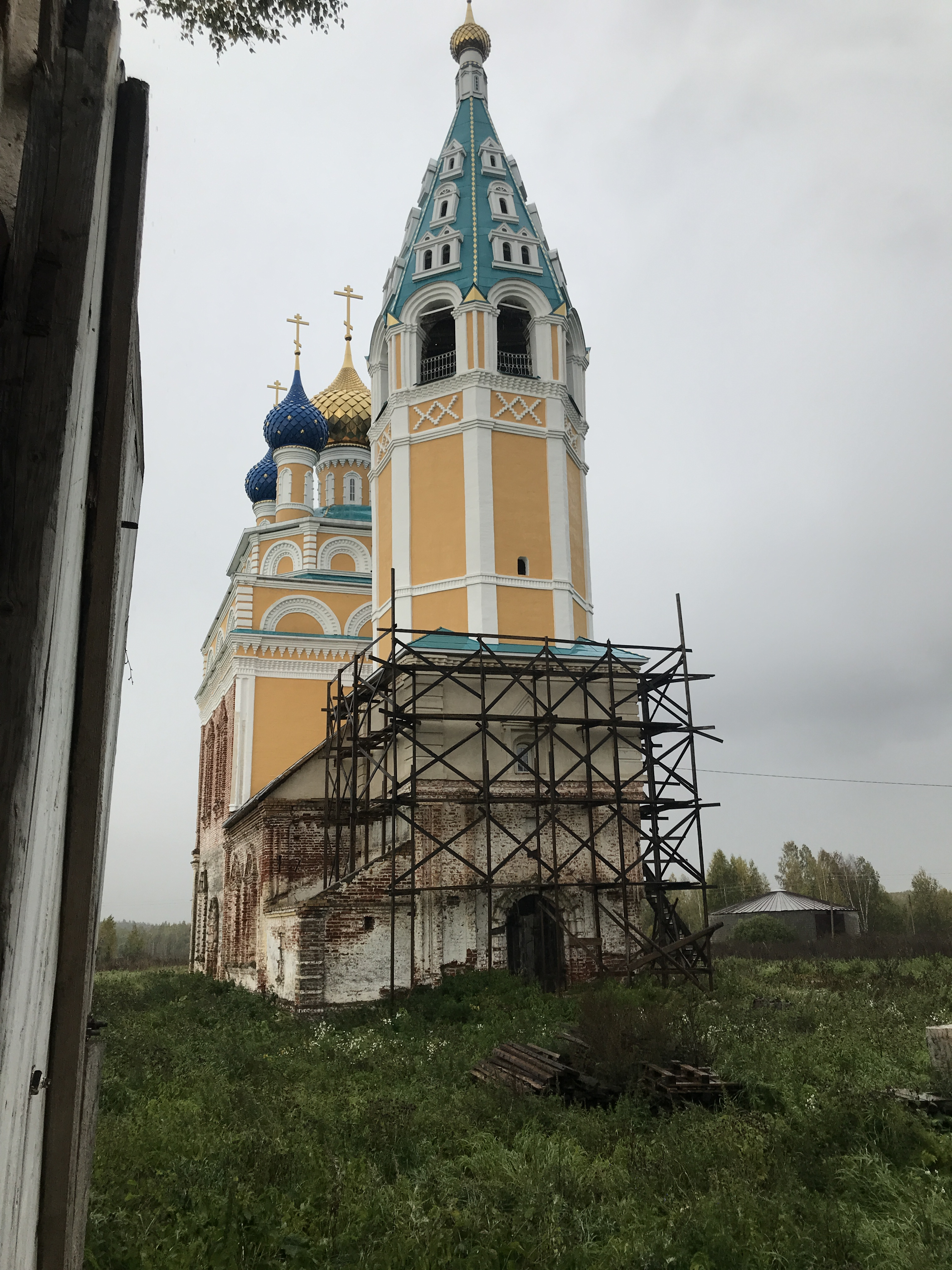 Вид на колокольню